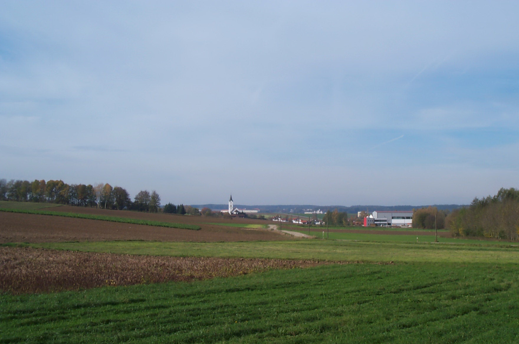 Laberweinting-Hofkirchen. Der Blick vom Waldrand am Poschenhof über Hofkirchen zum Kloster Mallersdorf. Rechts das Betonfertigteilwerk.